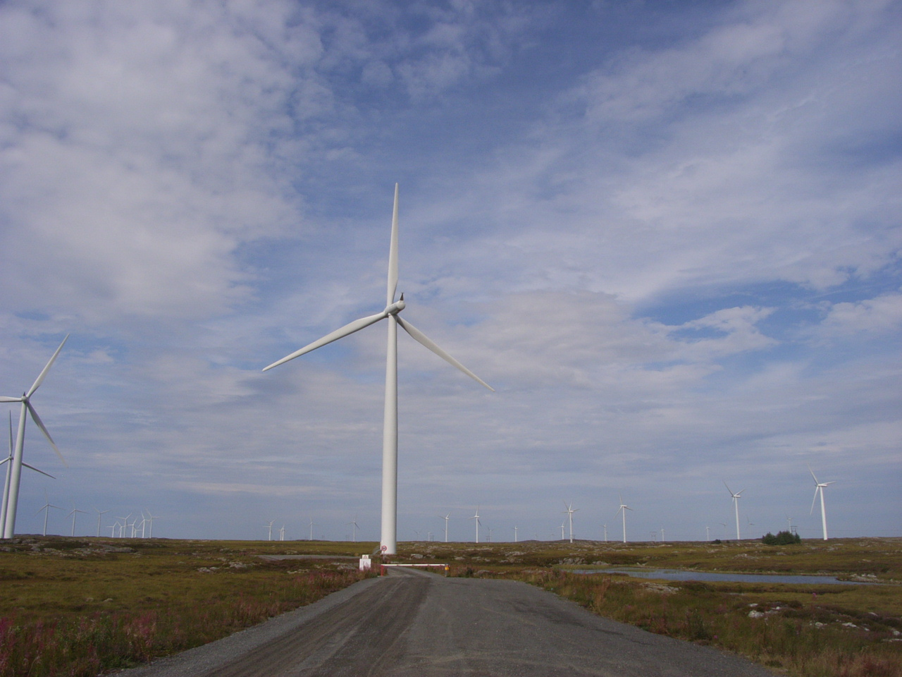 Smøla vindpark